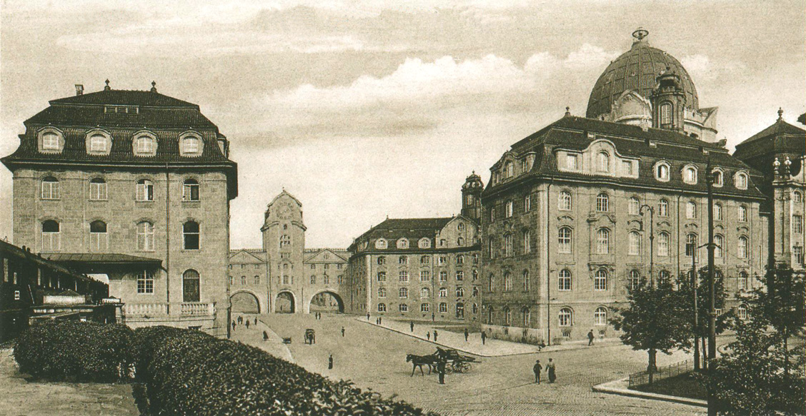 München, ehem. Verkehrsministerium in der Arnulfstraße, erbaut von Carl Hocheder